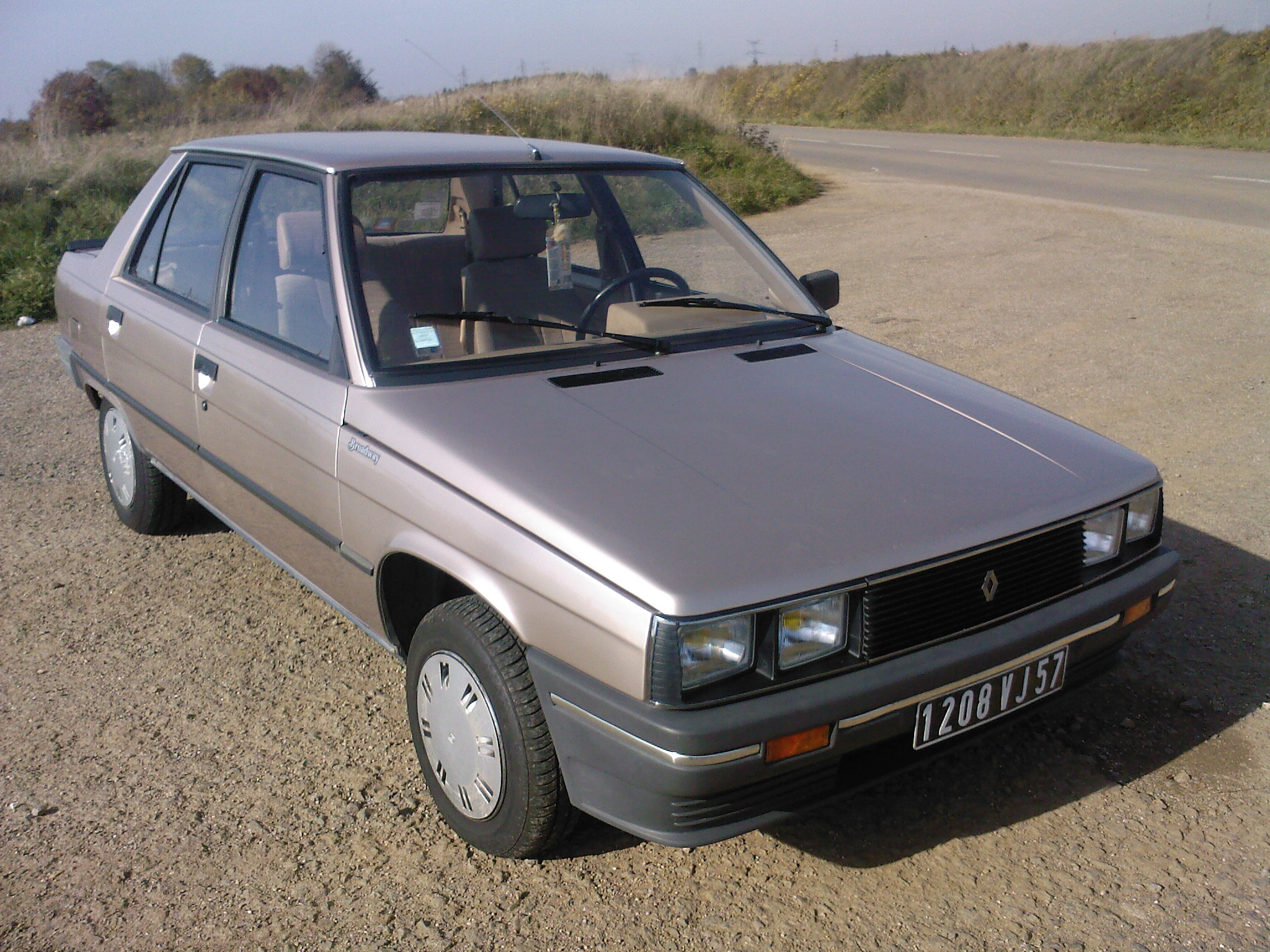 R9 phase 1 bis Broadway